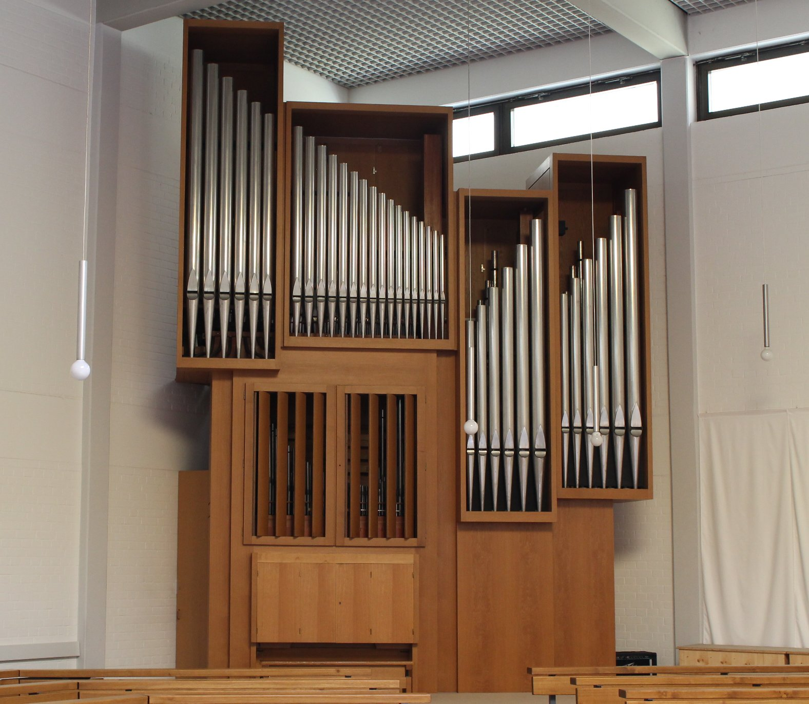 Orgel von St. Thomas in München-Unterföhring (ca. 1970, R. v. Beckerath, II/18)